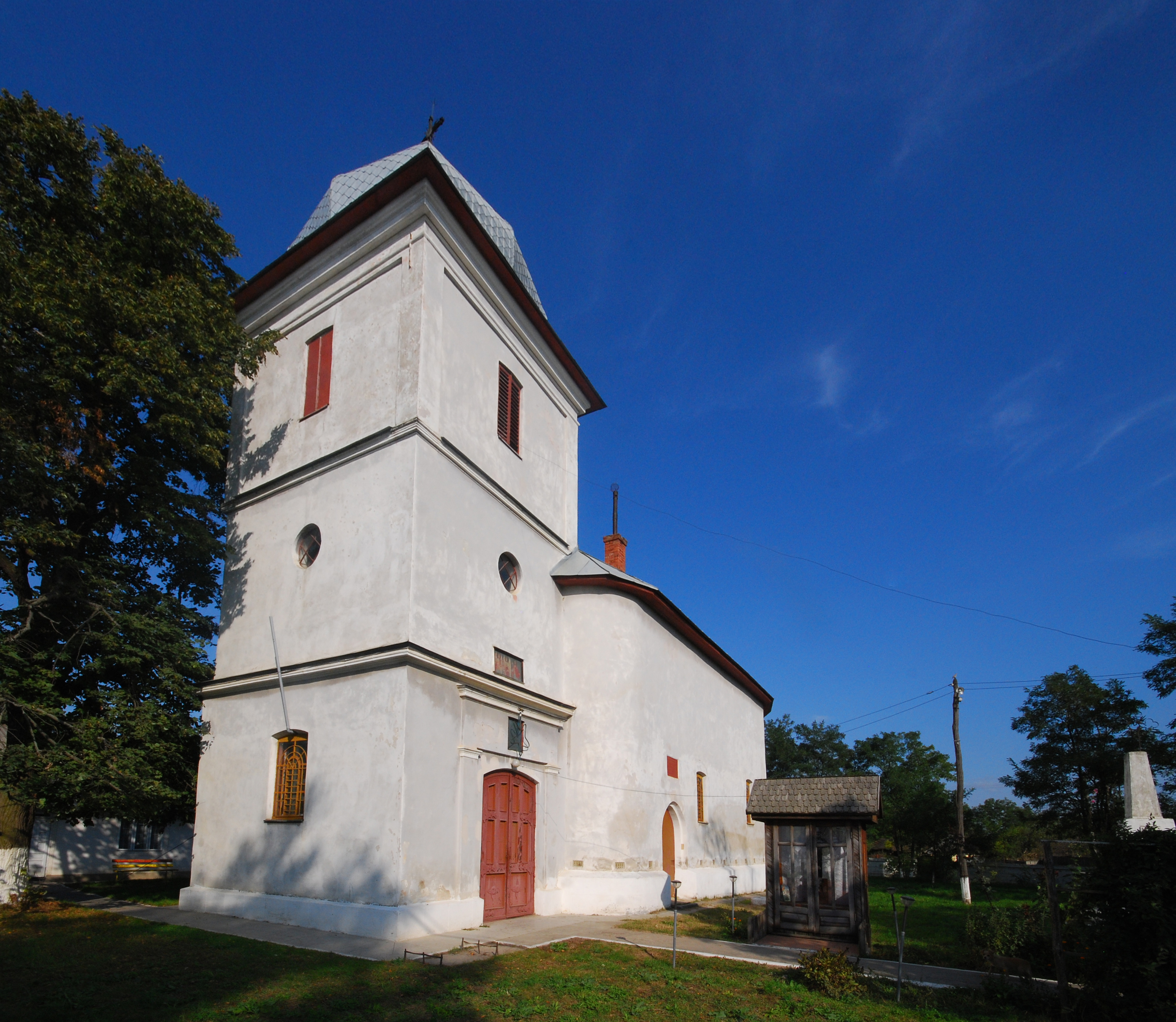 Biserica "Sf. Ioan cel Nou" 01